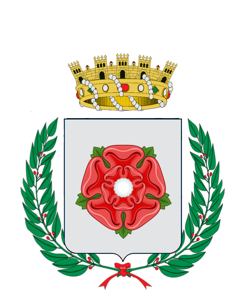 Escut de Reus de 1899 a 1940, Timbre de corona baronial, i al seu damunt rematada per una de mural. Una rosa, que serà de cinc pètals amb una de concèntrica. Rams de llorer als costats.